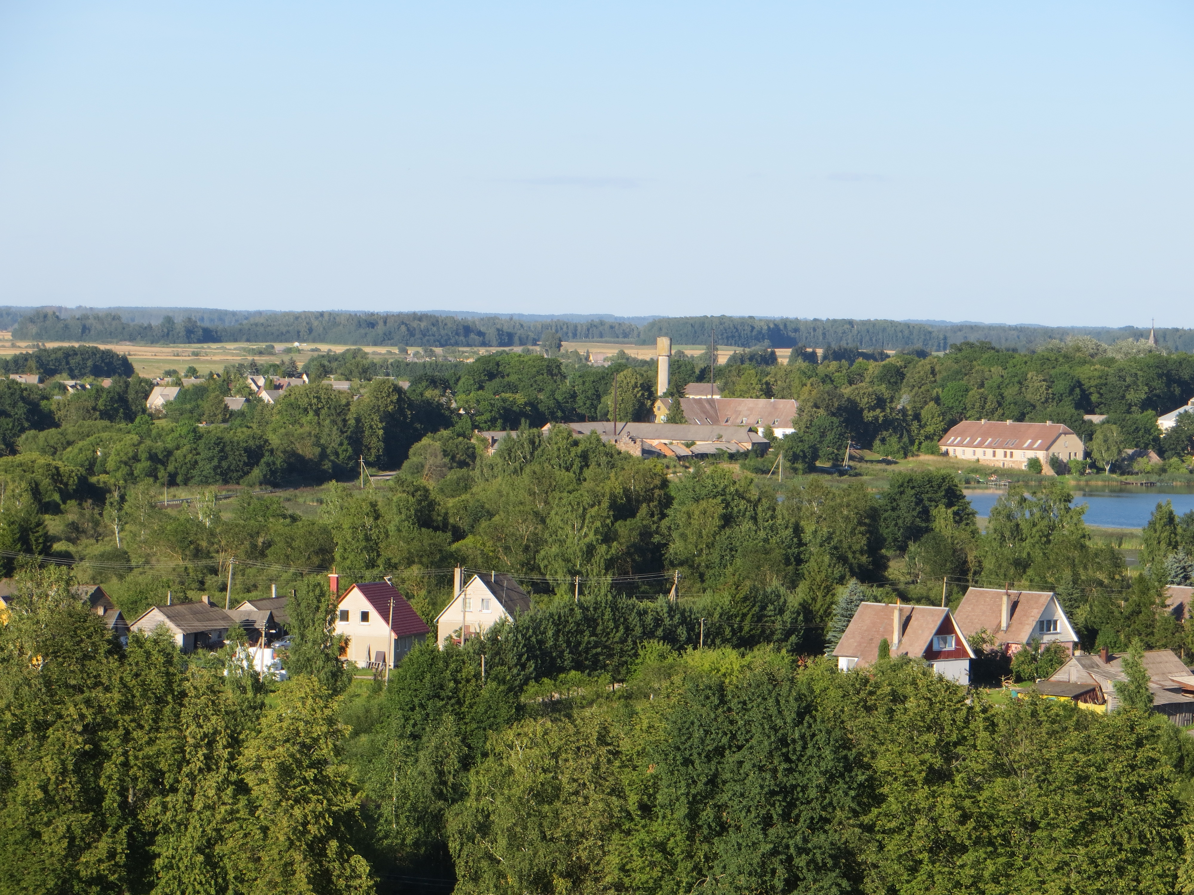 Kamajų sen., Lithuania